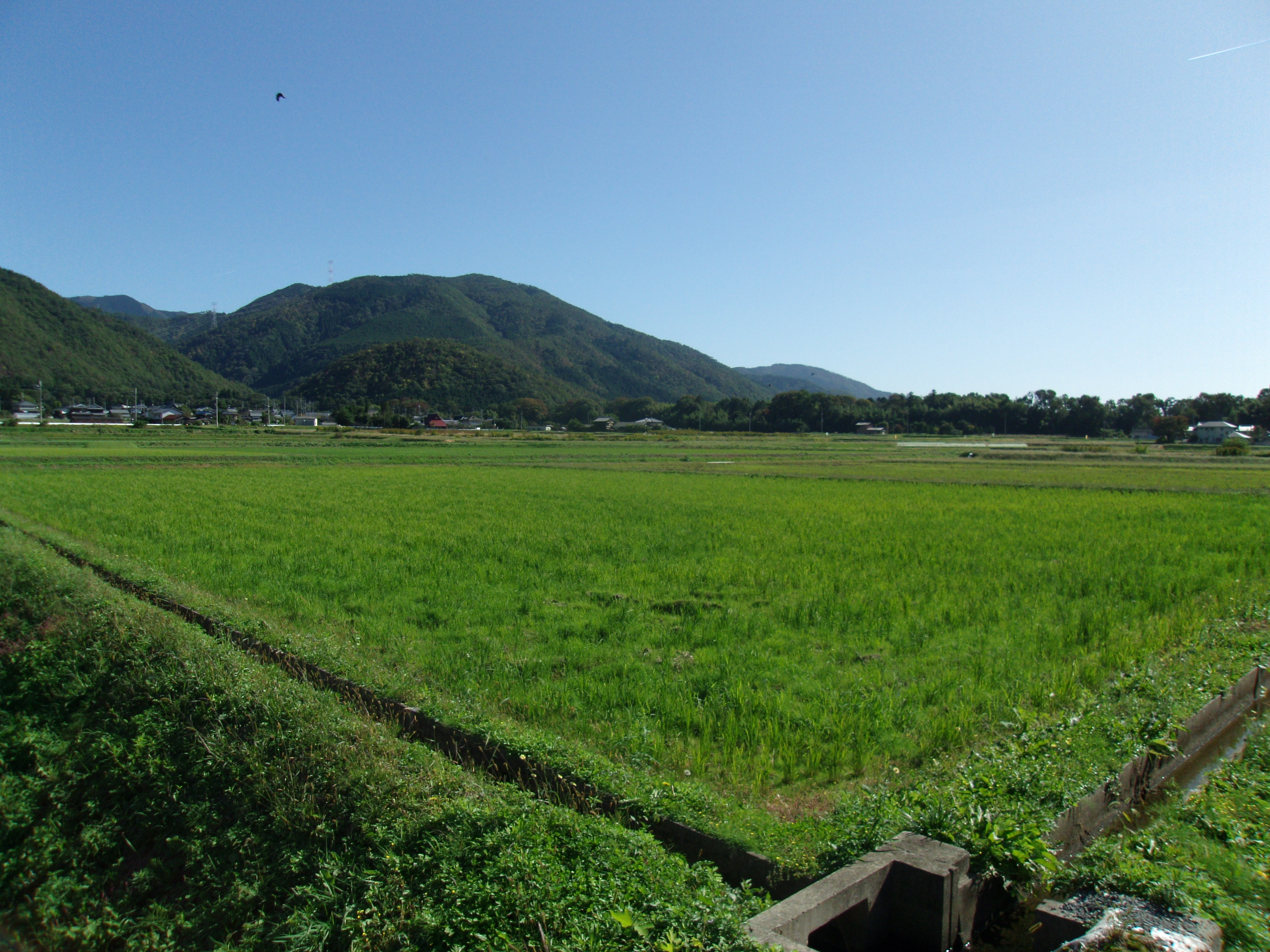 京都府南丹市八木町氷所新東畑3番地。現在は何もないが、地元の人によるといずれ記念碑を建てる予定があるとのこと。